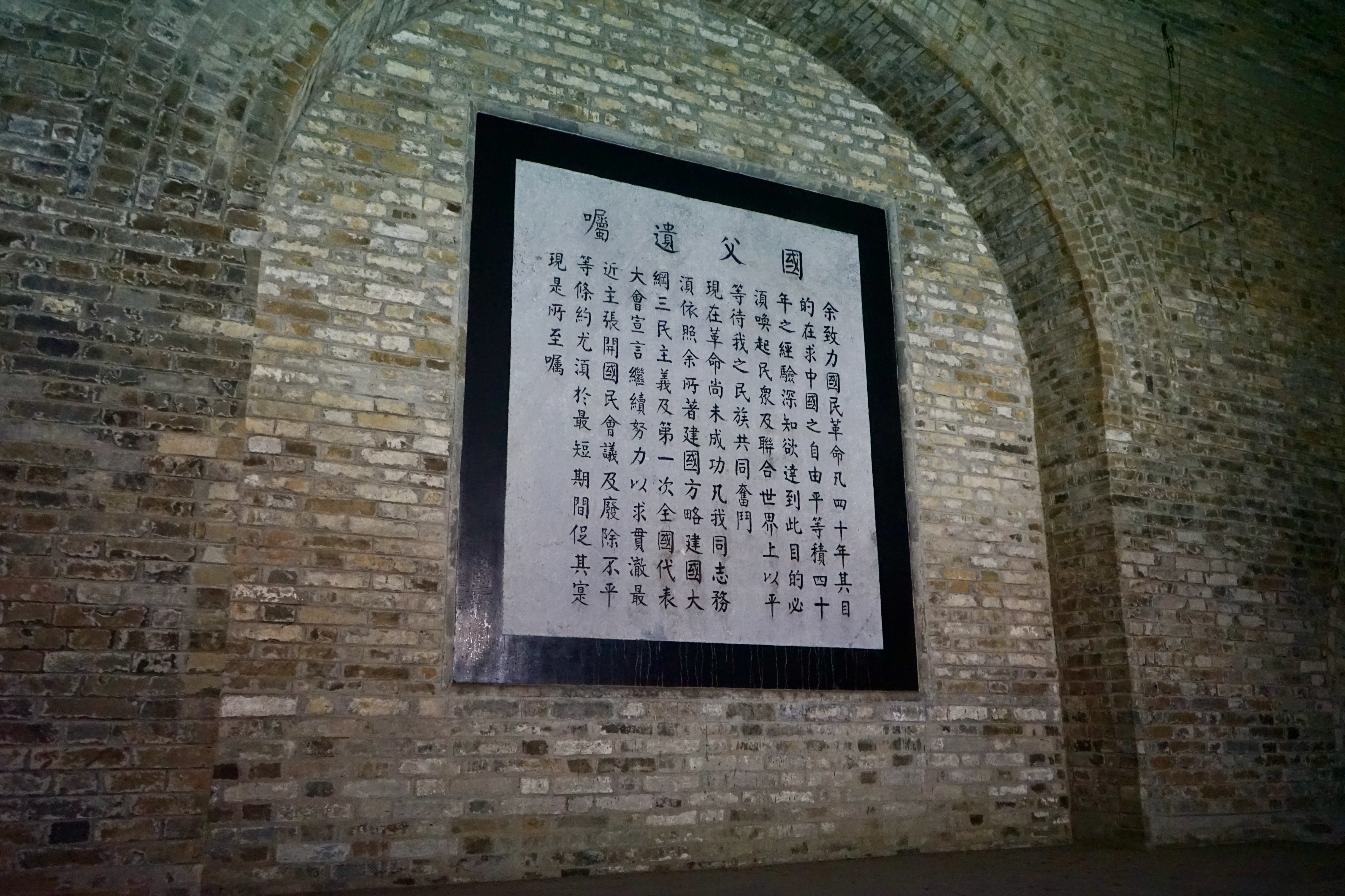 中文（中国大陆）: 辛亥革命名人蜡像馆中的国父遗嘱